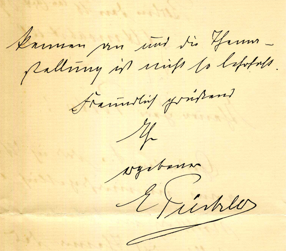 Handschrift des Reichsgrafen Eduard von Pückler († 31. März 1924) mit Unterschrift in einem Brief vom 6. Oktober 1909, gerichtet an den Präses des Verbandes für Gemeinschaftspflege und Evangelisation, Dr. Walter Michaelis.